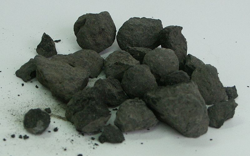 cement clinker